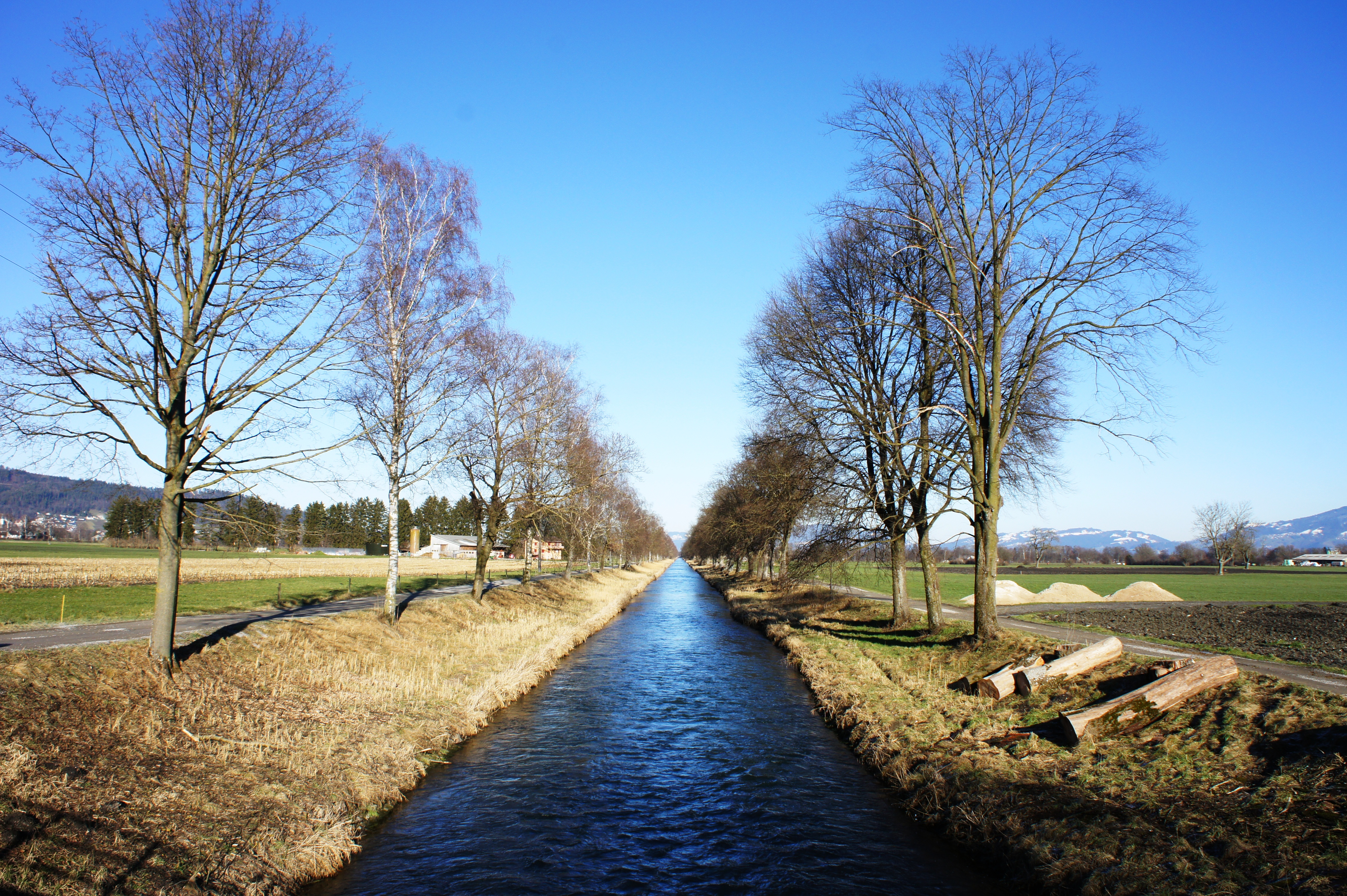 Blick aus Südwesten auf den Rheintaler Binnenkanal. Standort; Brücke der Verbindungsstrasse Rebstein - Kriessern (rechts).